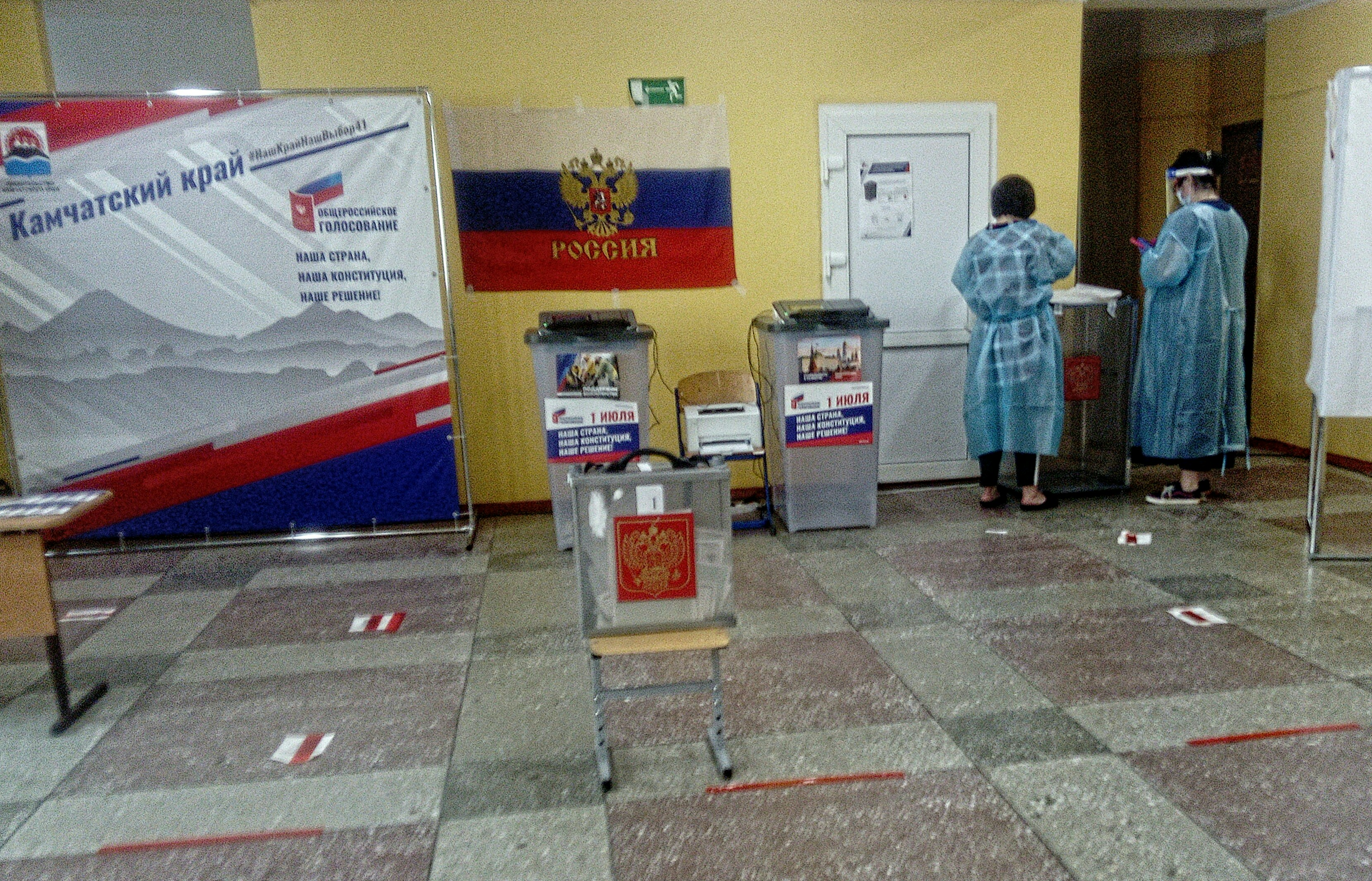 Избирательный участок N 41 30 июня 2020. Голосование по поправкам к Конституции России. Петропавловск-Камчатский, школа N 40